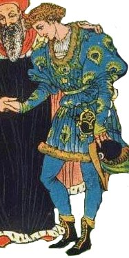 Гравюры по рисункам Крейна к сказке "Кот в Сапогах"